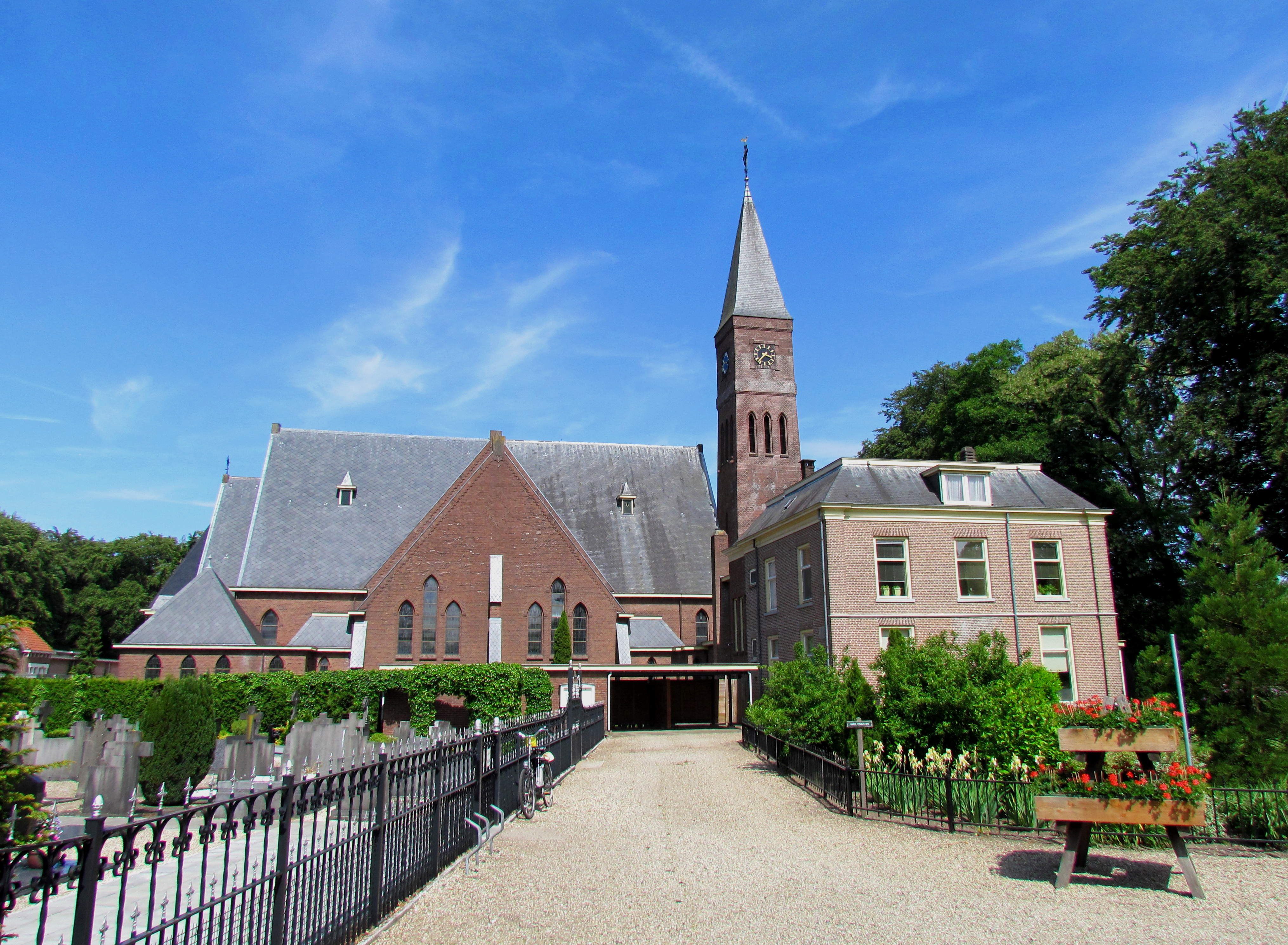 Rooms-katholieke kerk O.L. Vrouwe ten Hemelopneming (1930), Klarenbeek, NL. Rechts de pastorie, links kerkhof